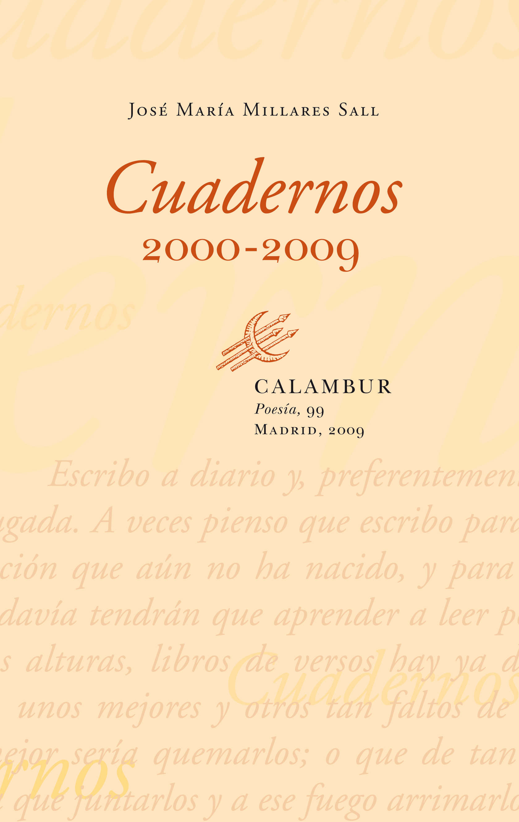 Cuadernos (2000-2009), José María Millares Sall Premio Nacional de Poesía 2010 Calambur, poesía 99. 232 p. ISBN: 978-84-8359-191-8